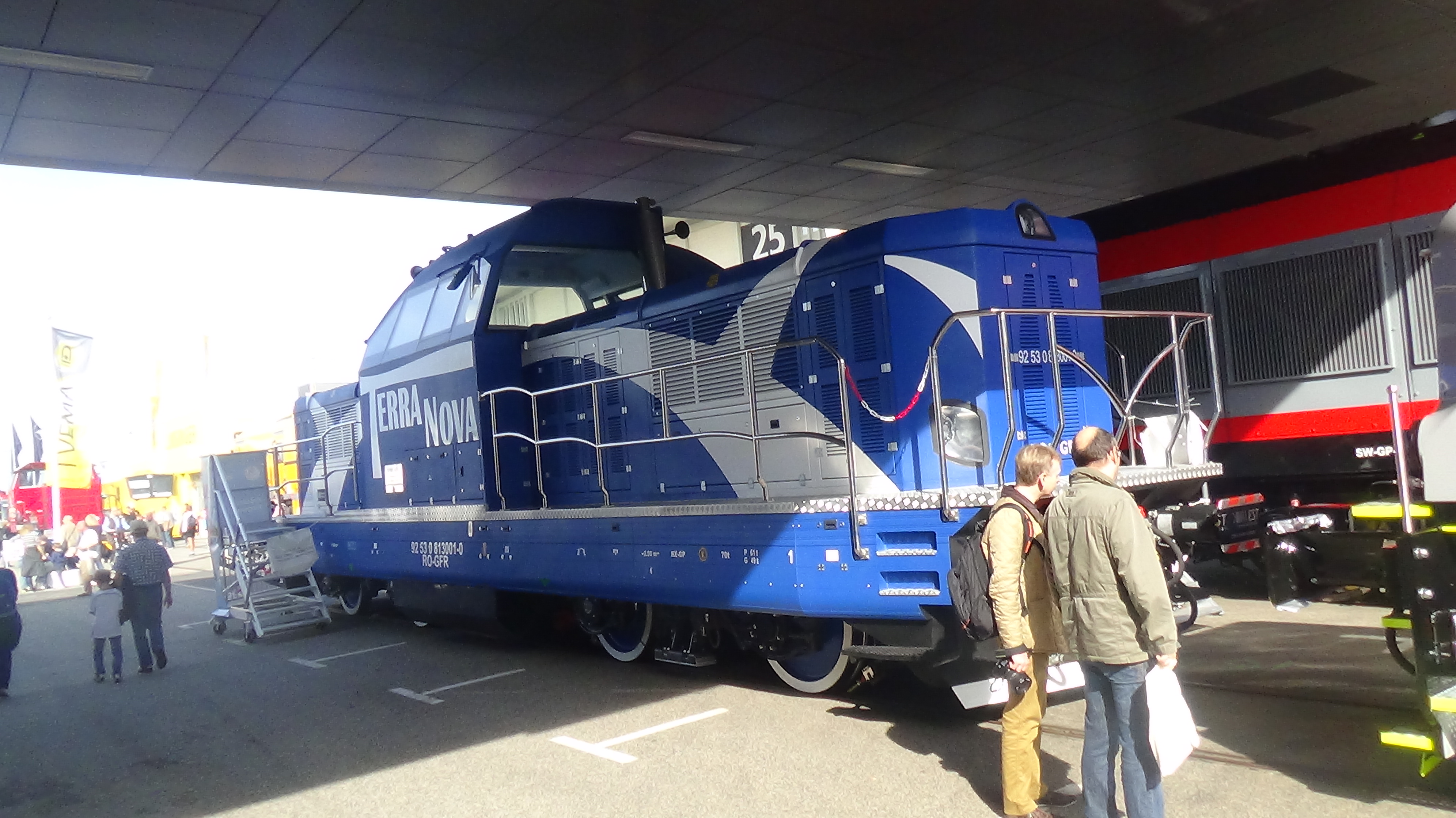 Reloc SA Terranova Locomotive